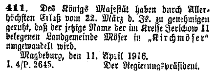 Namensänderung von Möser zu Kirchmöser am 22. März 1916 laut Erlass des Königs im Amtsblatt